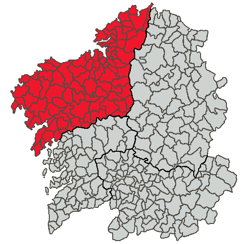 Mapa coa localización da Provincia da Coruña.